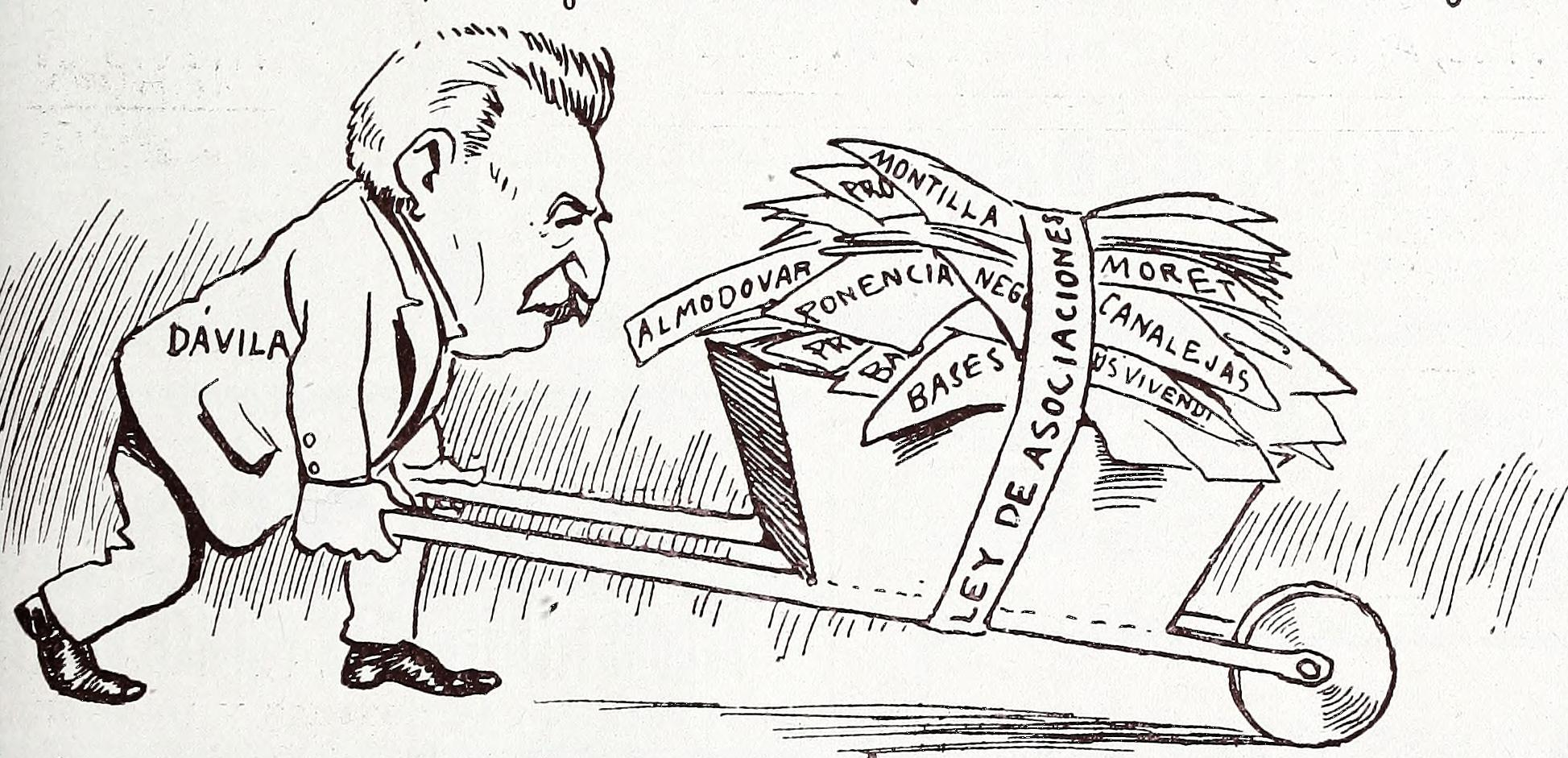 La Semana Pasada.